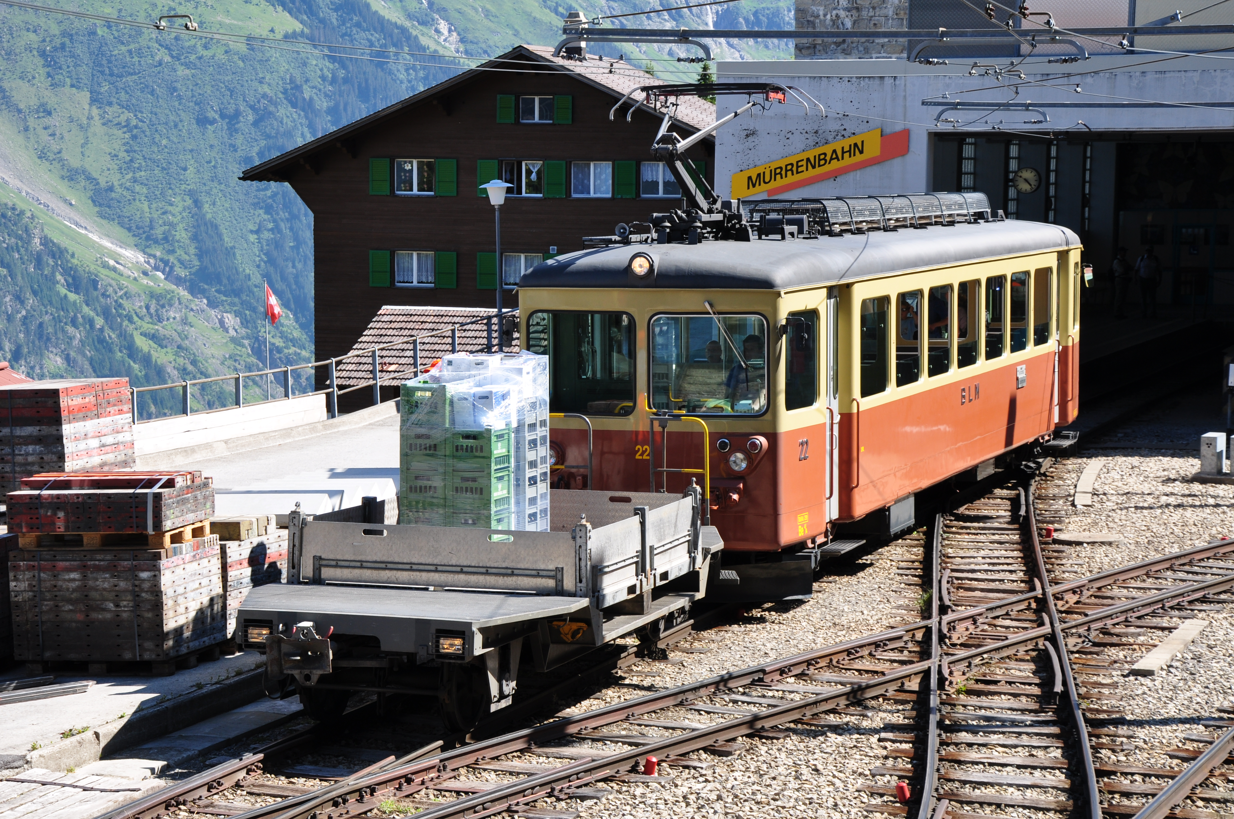 Switzerland, Canton of Bern, Mürrenbahn